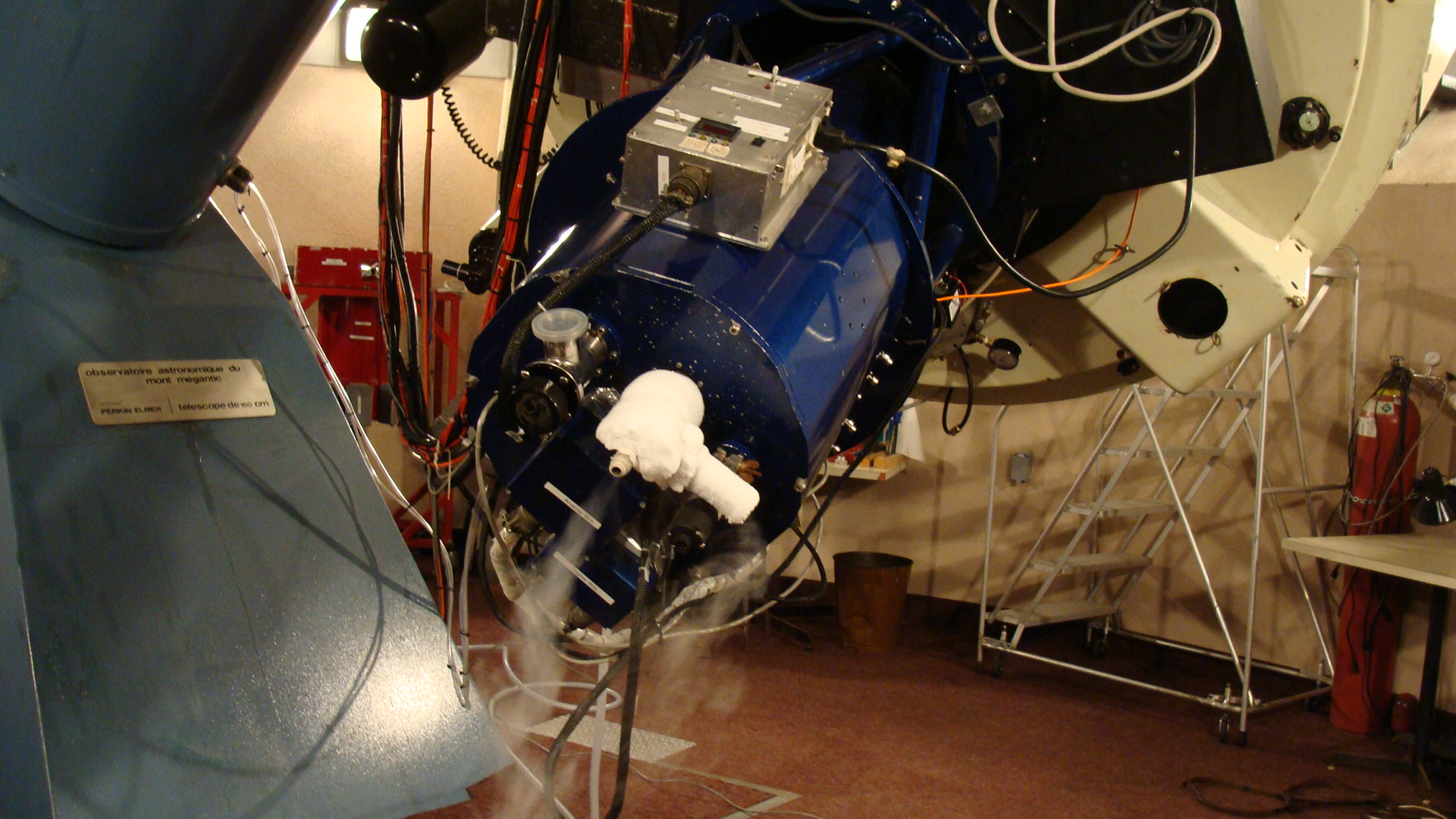 Camera PAnoramique Proche InfraRouge (CPAPIR), une caméra d'observation astronomique développée par des chercheurs et étudiants de l'Université de Montréal. Refroidie à l'azote liquide.